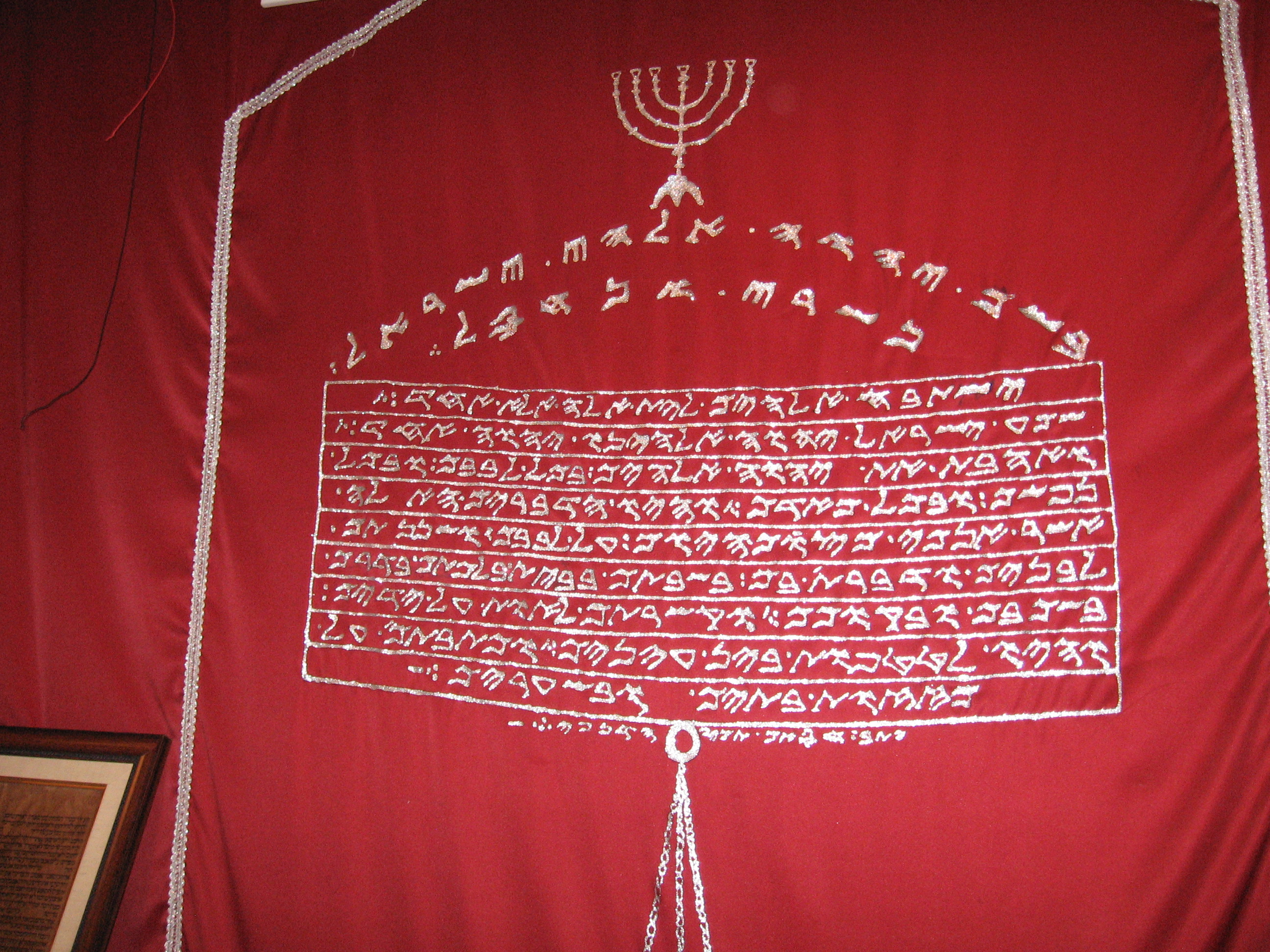 תרבות השומרונים בהר זריזים